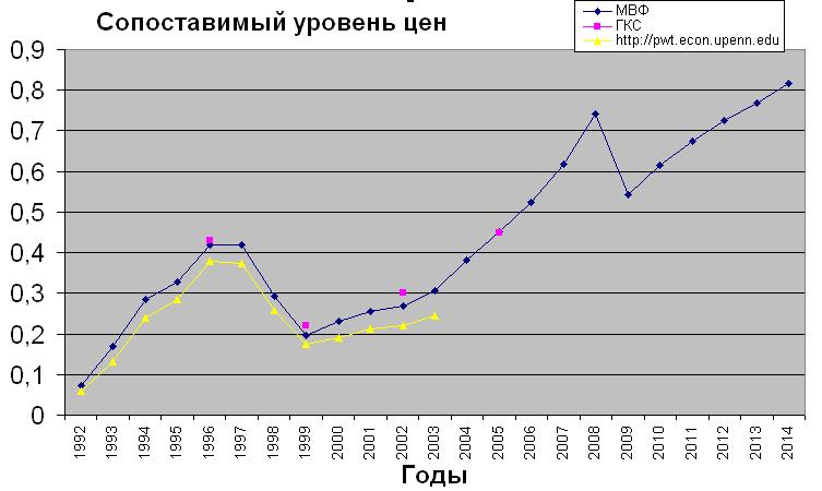 Сопоставимый уровень цен в России.